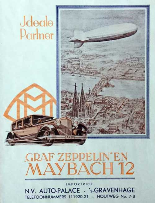 Maybach (D) - N.V. Auto Palace, 's Gravenhage advertentie mei 1931